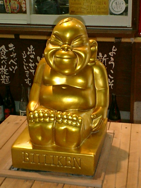 ビリケン（2006年5月 MASAが大阪市新世界の串カツ店「壱番」の店頭で撮影） Billiken